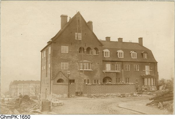 Bjerkeska villan, Dicksonsgatan 2, Lorensberg, Göteborg. Bildsamlingen vid Göteborgs stadsmuseum.